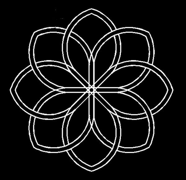 Lotus Kolam